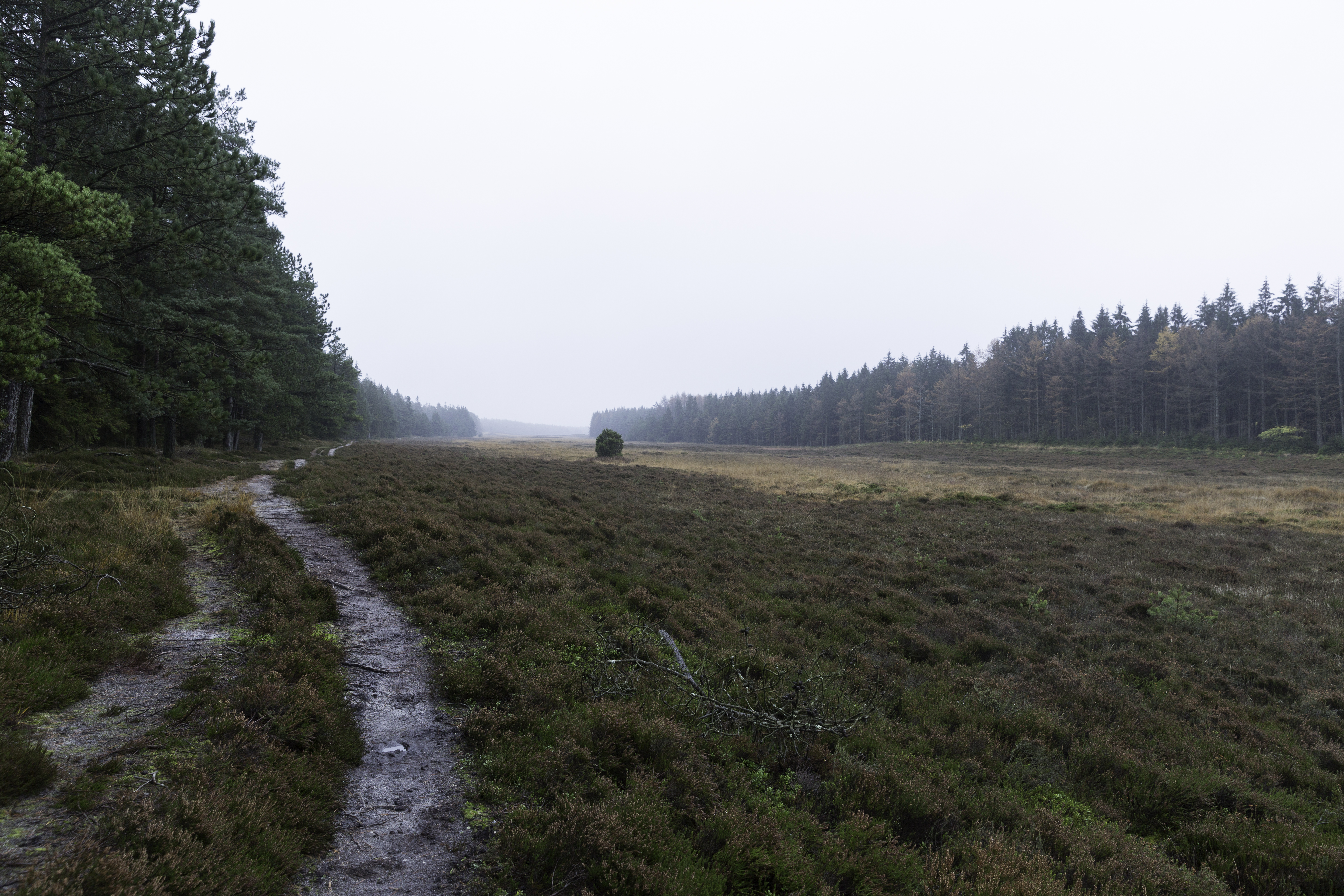 smeltevandsdalen, Kompedal